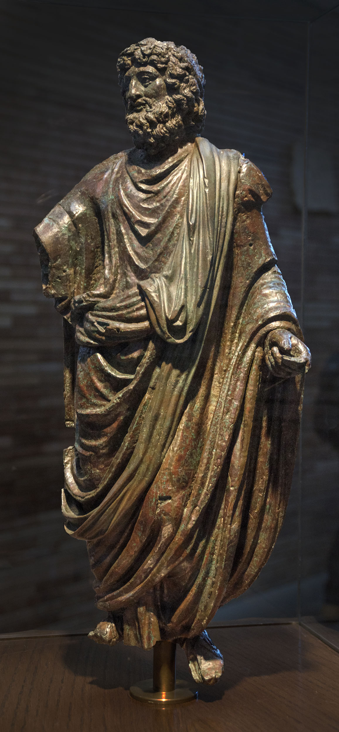 Estatua de unos 60 cm de altura, hecha en bronce fundido, que representa al Genio del Senado de Roma. Se encontró en 1974 en el Templo de Diana de Mérida. Está datado en el siglo II.